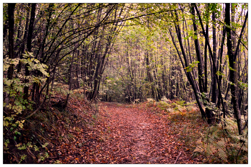 Il Sentiero di San Antonio, parte da Monte Mauro.